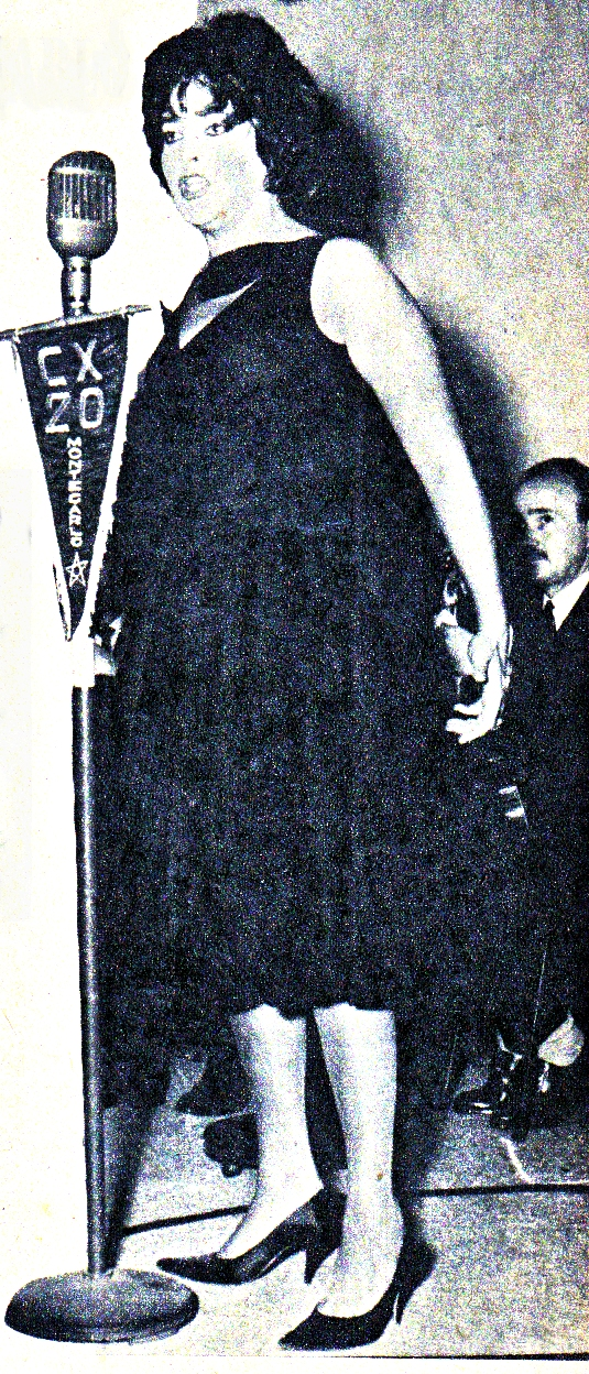 La cantante brasilera Maysa Matarazzo, destaque de CX20 en 1961, desde el principal balneario uruguayo, Punta del Este.